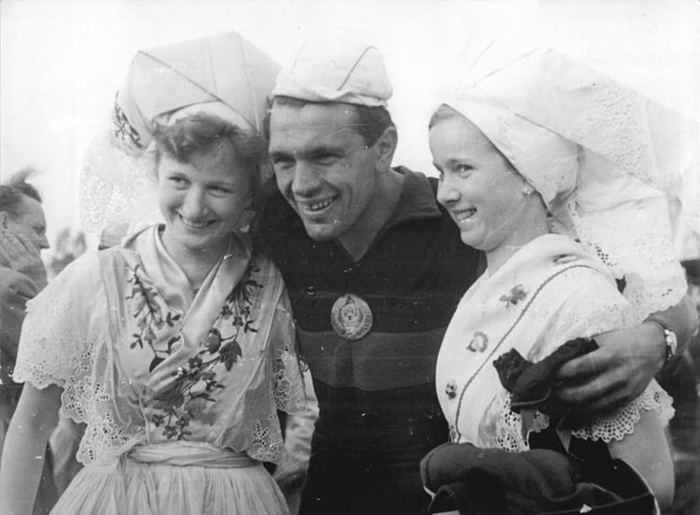 VIII. Friedensfahrt, Viktor Werschinin Zentralbild Kronfeld 13.5.1955 VIII. Internationale Friedensfahrt Prag-Berlin-Warschau 1955 - 9. Etappe von Berlin nach Cottbus über 126 km. UBz: Spreewälderinnen hatten zum Empfang der Friedensfahrer in Cottbus ihre Trachten angezogen. Der Etappensieger Viktor Werschinin (CSR) war "Hahn im Korb".